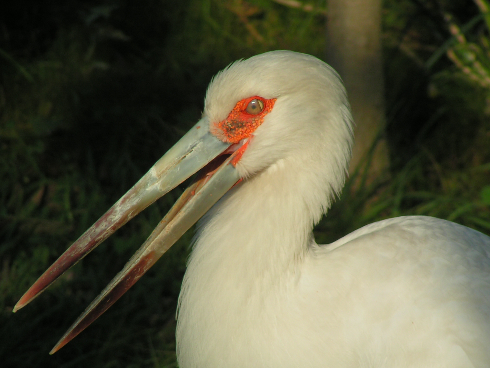 Tuyango, cigüeña americana o tabuyayá (Ciconia maguari)